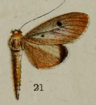 Phryganodes biguttata from Sierra Leone